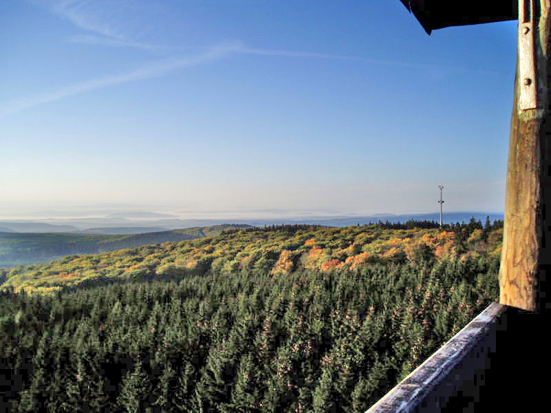 Bildbeschreibung: überarbeitete Version Quelle: Image:GermanyBingerwaldBlickSalzkopf.jpg Fotograf/Zeichner: HermannSchmitz, Sorjonen